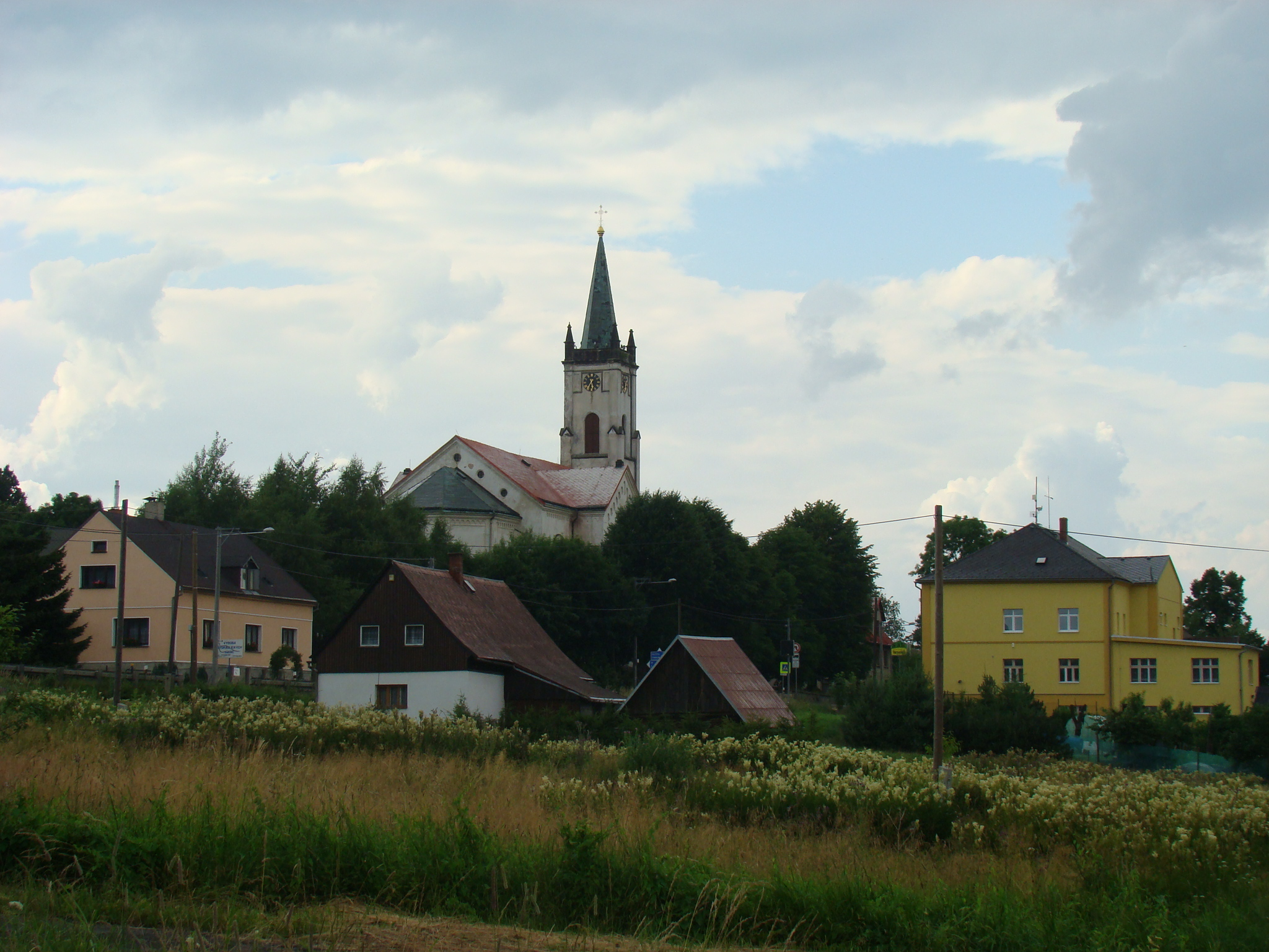 Kostel sv. Františka z Assisi ve Studánce, Varnsdorf, okres Děčín.